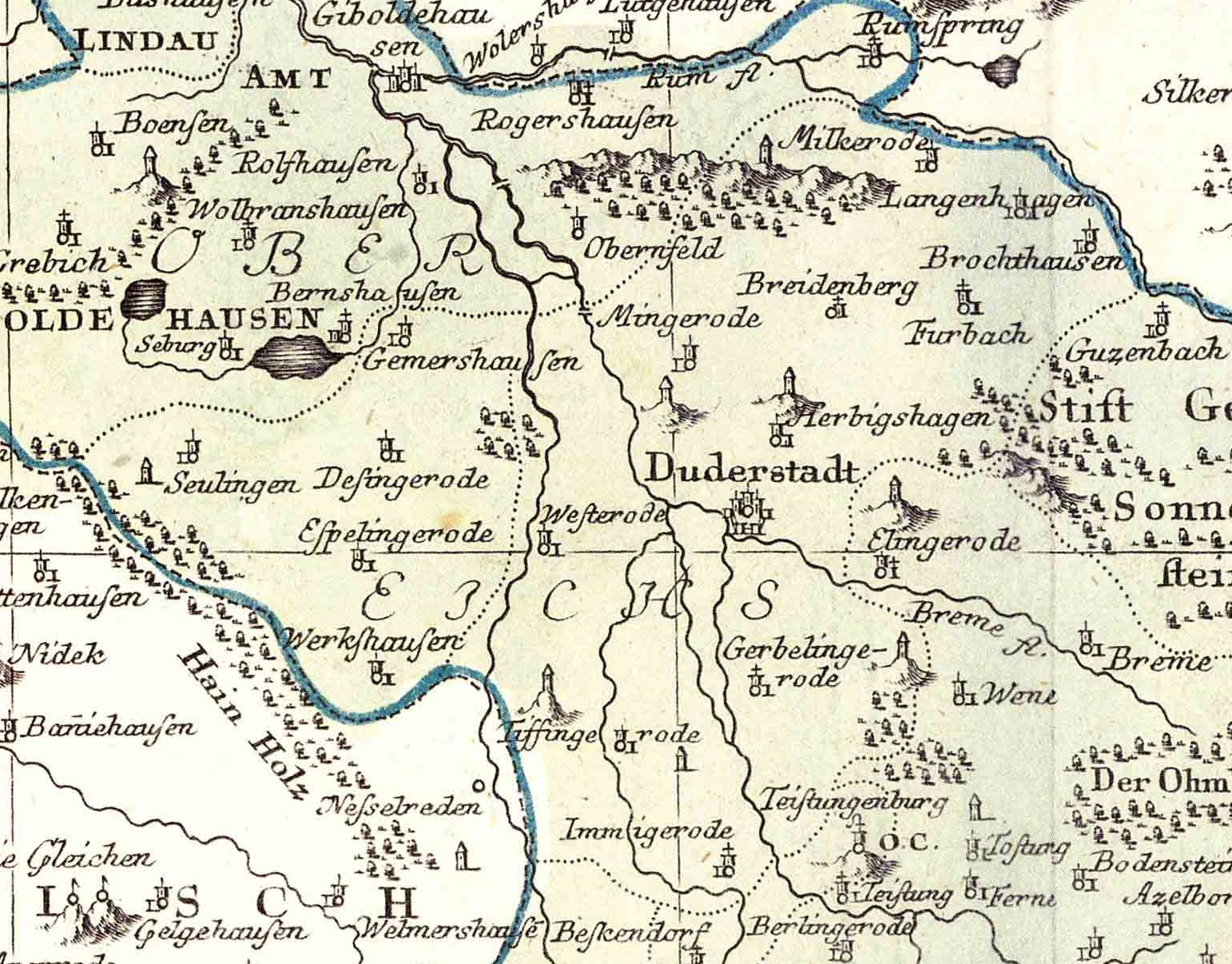 Ausschnitt aus der historischen Karte "Tractus Eichsfeldiae": das Amt Duderstadt